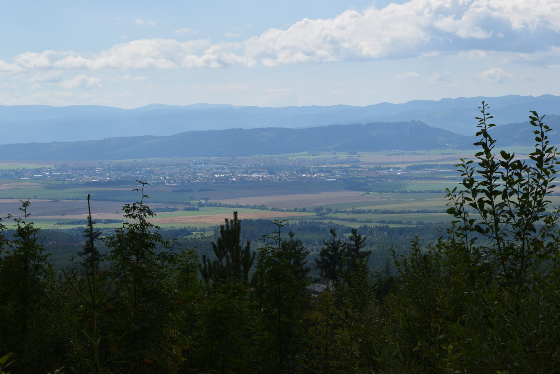 Pohľad z Hrebienka: Popradská kotlina a pásmo Kozích chrbtov